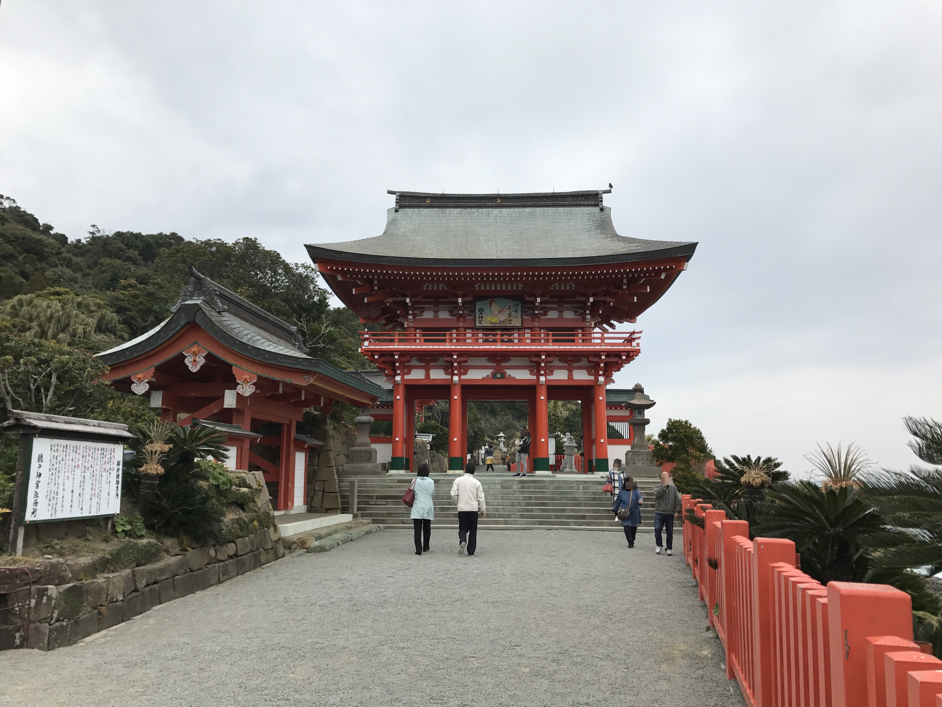 鵜戸神宮の楼門